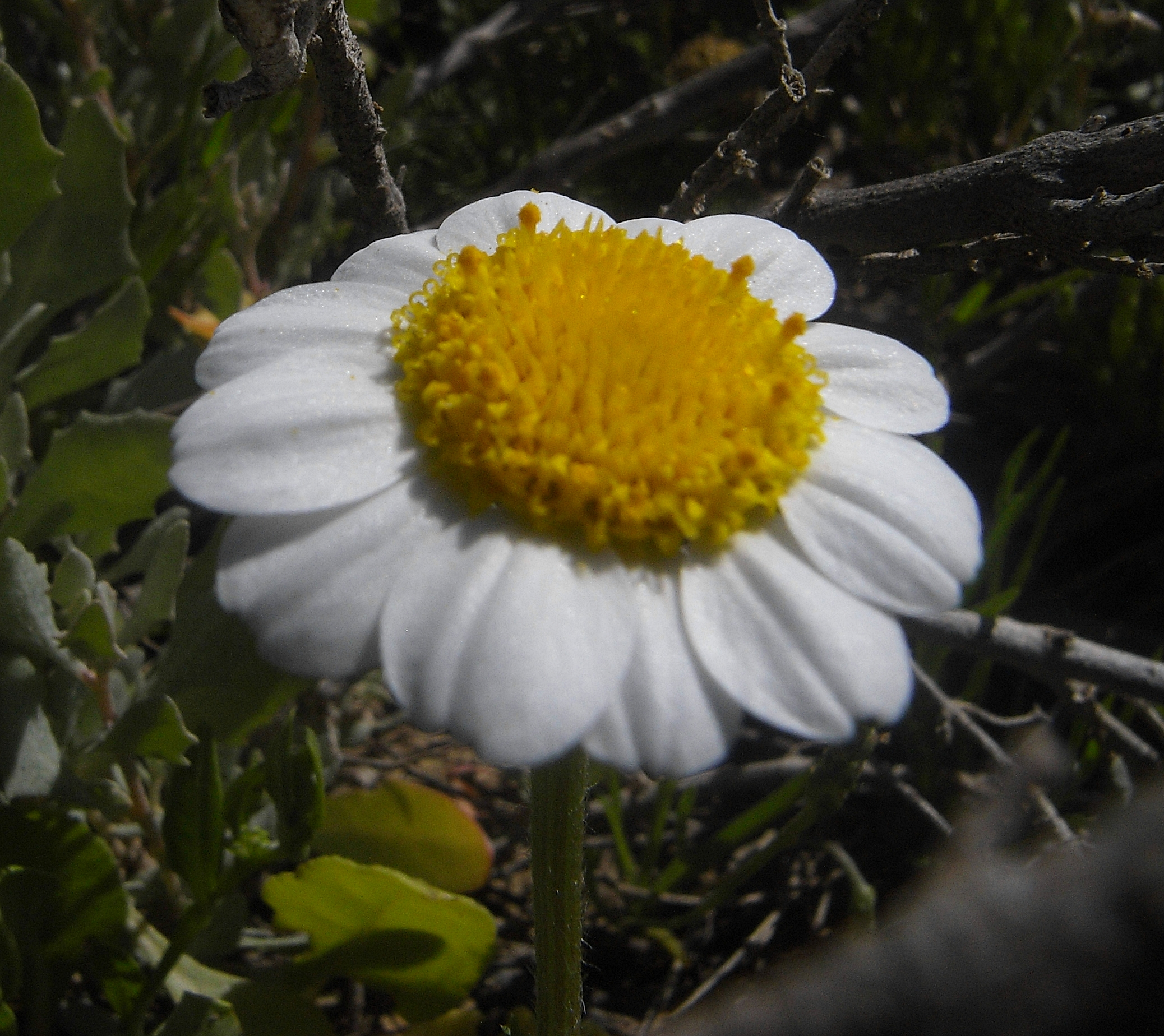 Anthemis maritima, Sebkhat Kelbia nahe Kondar, Tunesien, April